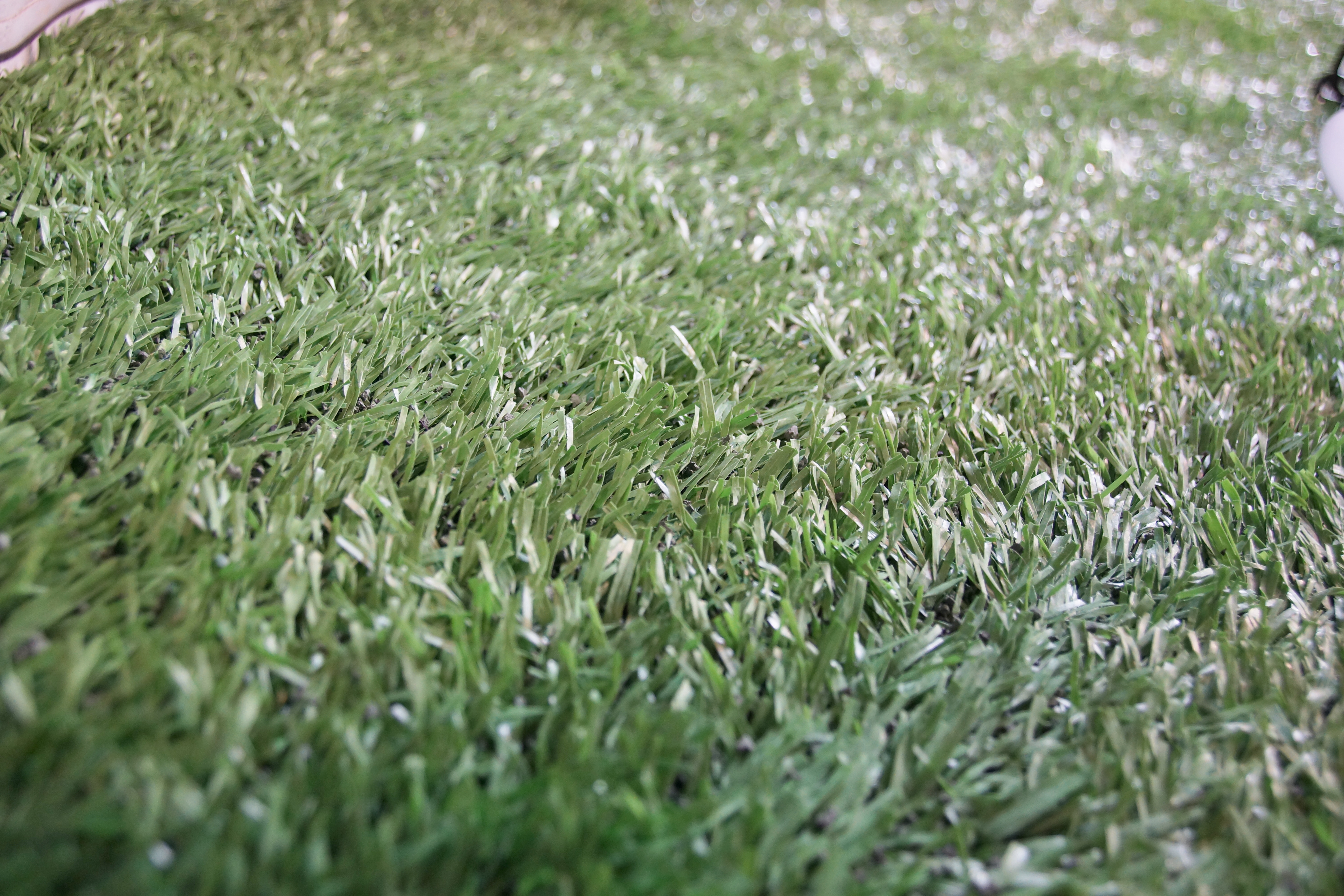 東京ドームに敷設されている、米・フィールドターフ社製の人工芝「フィールドターフHD」。